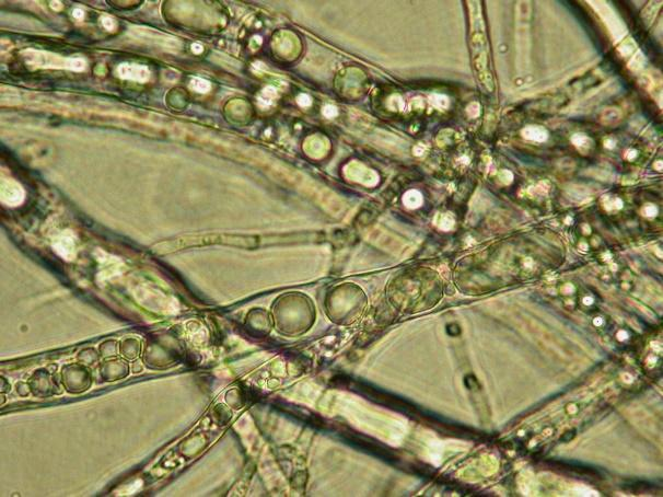 Mucor circinelloides - kuleczki tłuszczów